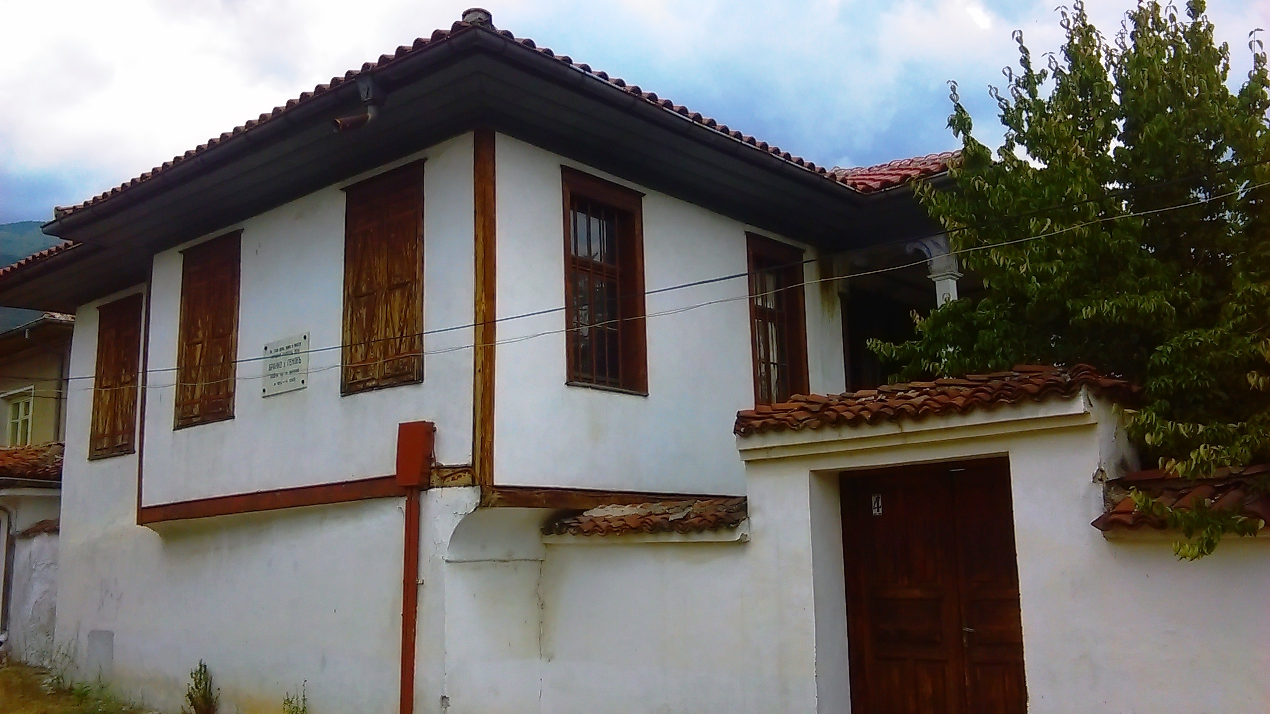 Къщата на Брайко Хаджигенов в Карлово